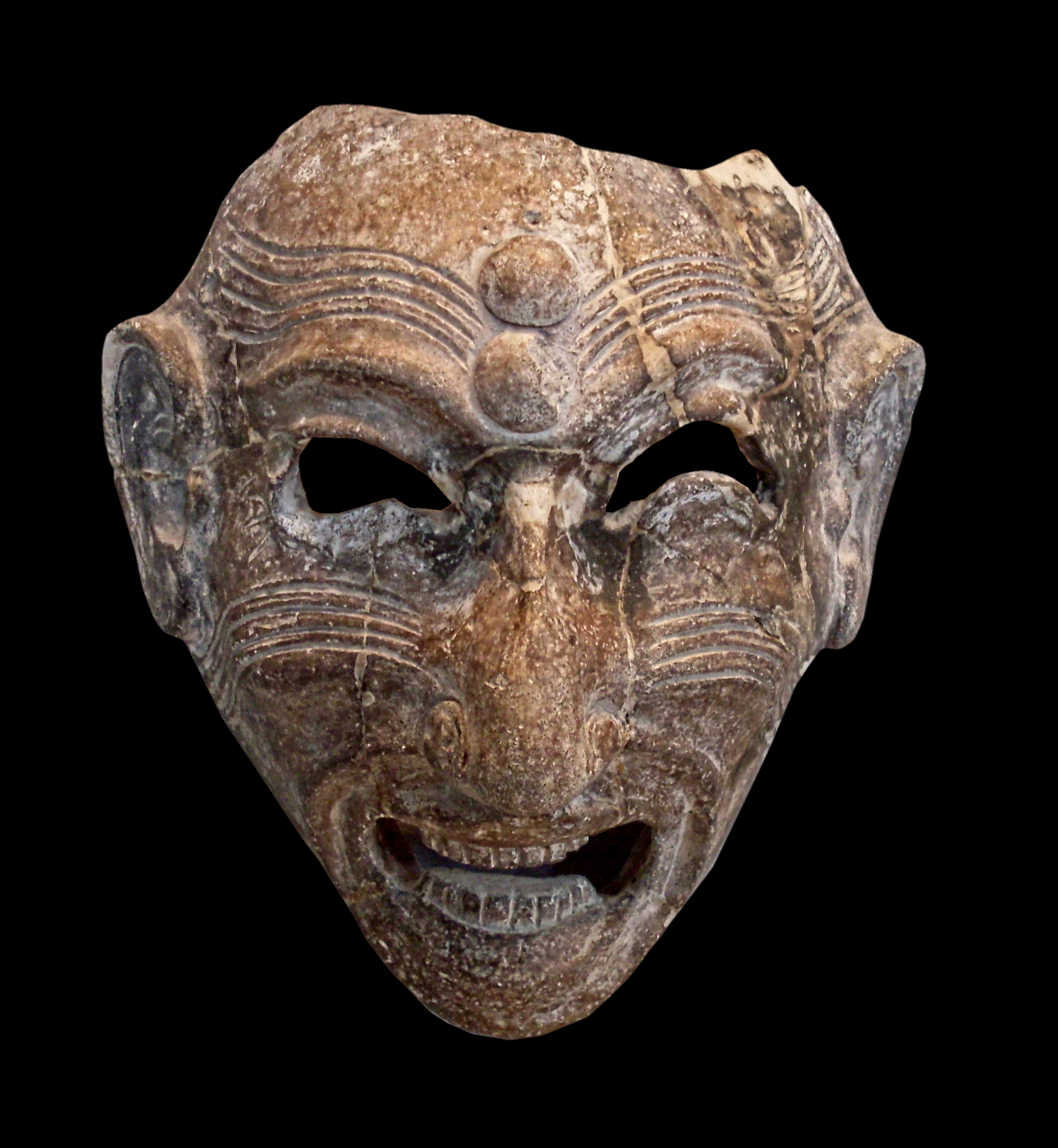 Masque carthaginois au musée nationale de Bardo